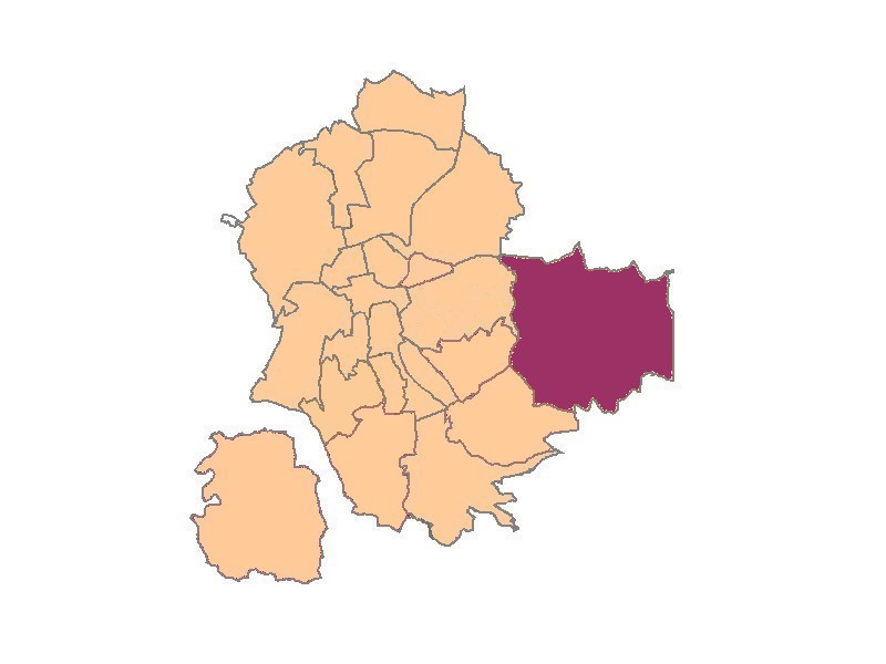 Plan de saint-etienne quartier de Terrenoire